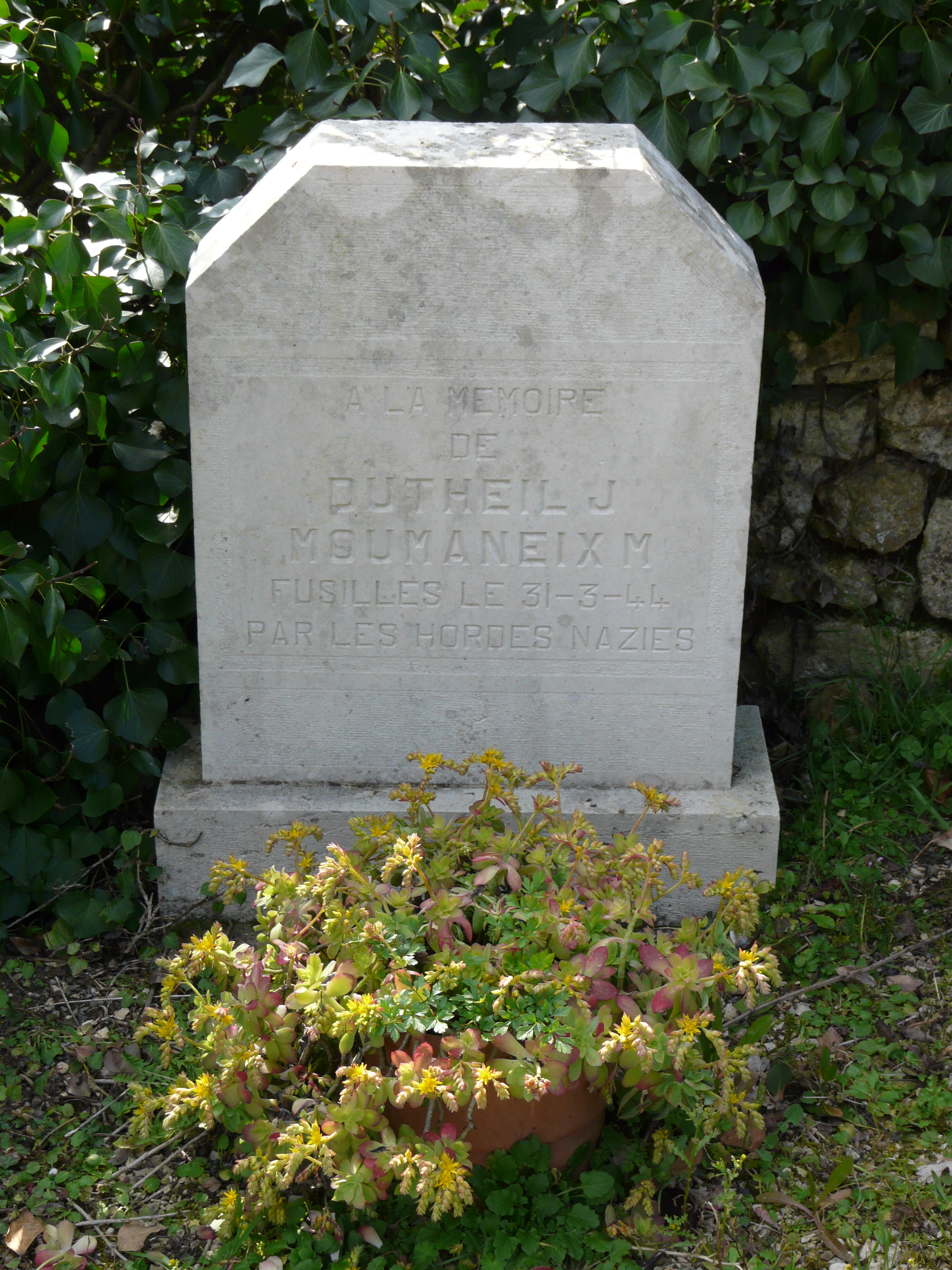 Stèle à la mémoire de deux personnes fusillées par les Allemands le 31 mars 1944, Saint-Rabier, Dordogne, France.